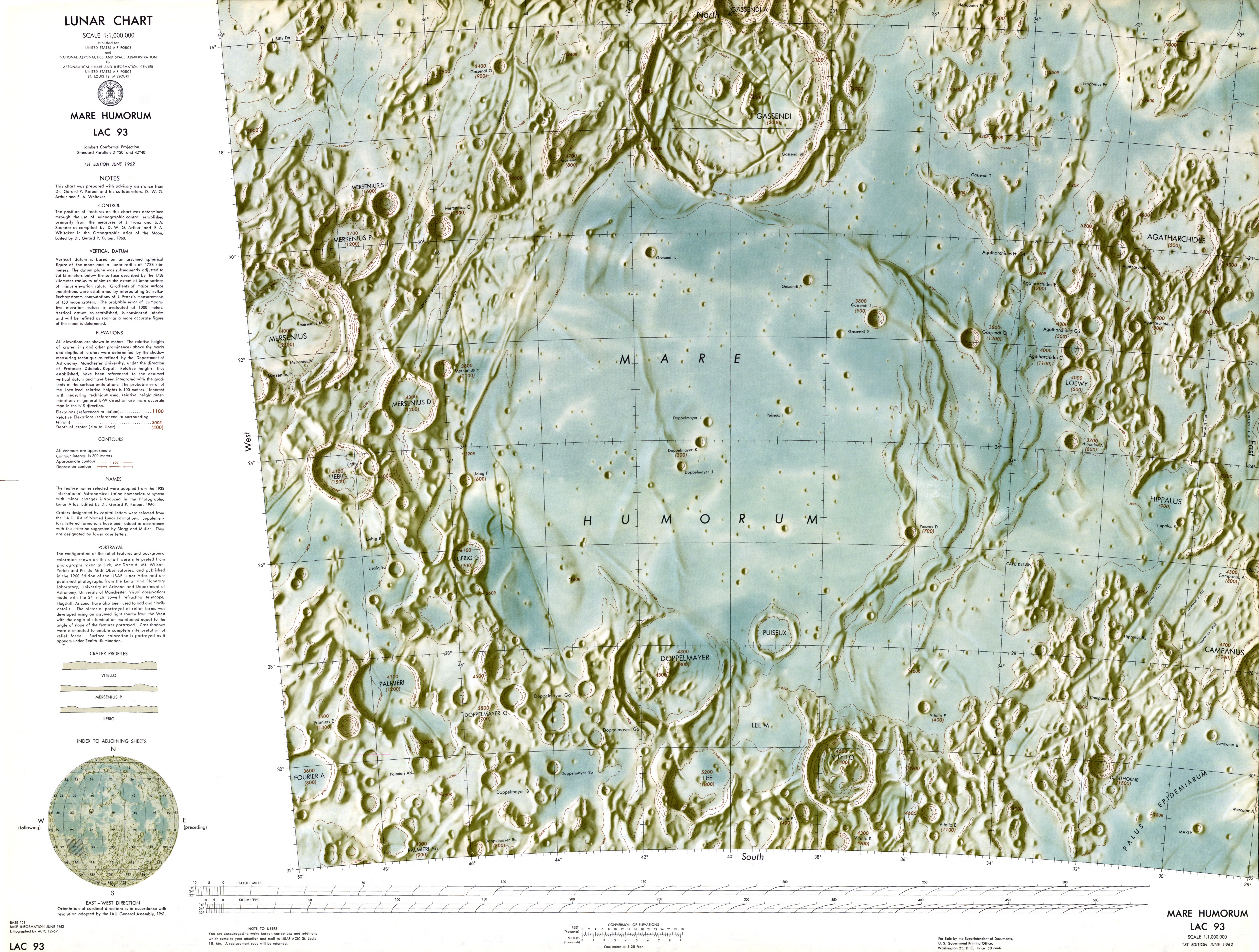 1:000 000 scale lunar chart - Mare Humorum (LAC 93)